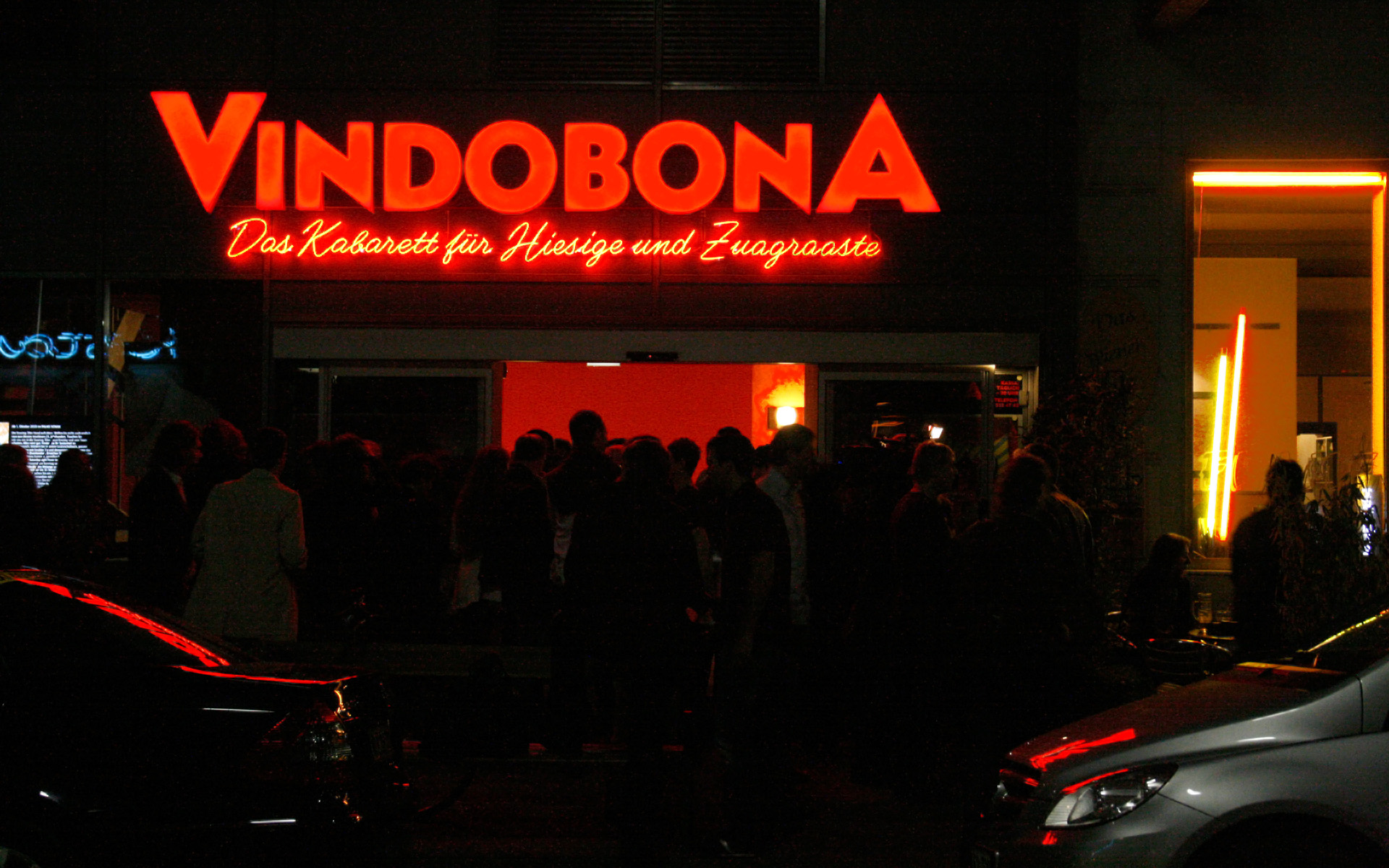 Das Vindobona in Wien am Abend der Verleihung des Österreichischen Kabarettpreises 2010.